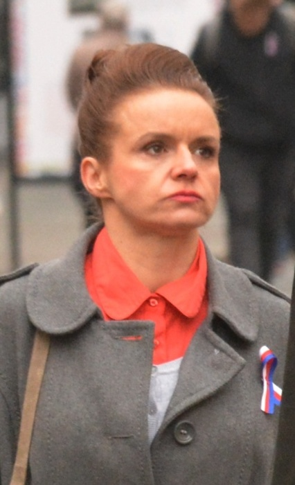 Herečka Halka Třešňáková jako sekretářka Lenka při natáčení seriálu Kancelář Blaník na pražské Národní třídě během vzpomínkové akce k událostem 17. listopadu 1989.